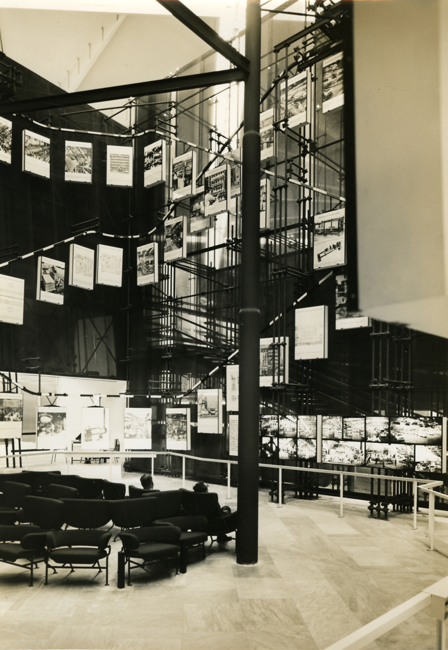 Servizio fotografico : Torino, 1961 / Paolo Monti. - Stampe: 6 : Positivo b/n, gelatina bromuro d'argento/ carta, 24x30. - ((Al verso delle stampe manoscritto numero di negativo corrispondente: 39053, 39245, 39247, 39497, 39498, 39500. - Sul coperchio della scatola, manoscritto a pennarello: "Italia '61". - Occasione: Documentazione dell'esposizione internazionale Italia '61 tenutasi a Torino in occasione del centenario dell'unità d'Italia. - Fonte: Rubrica di Paolo Monti: Archivio fino 1-4-1961/ 31-3-1963 (1961-1963), presso Archivio Paolo Monti